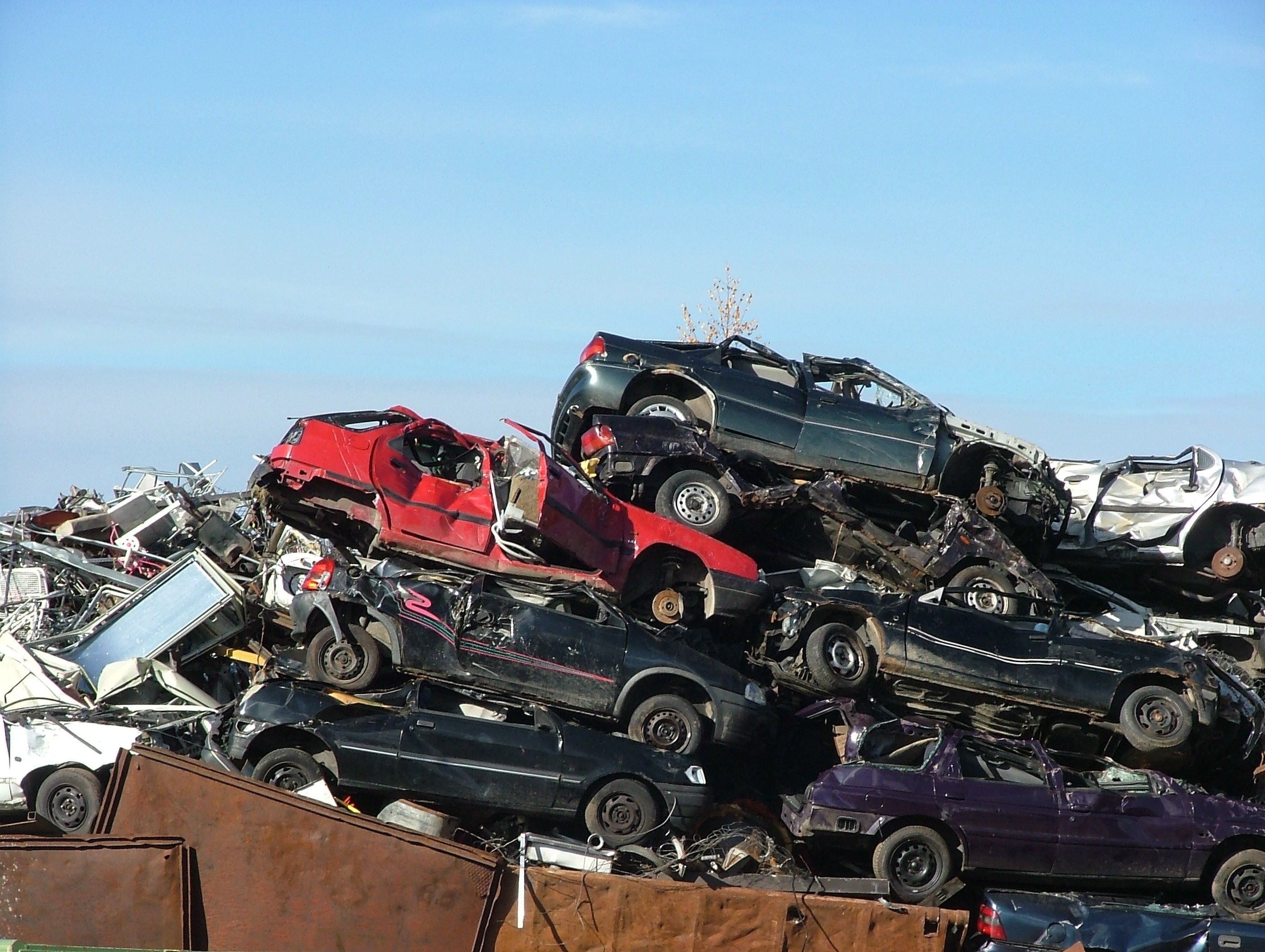 Schrottplatz